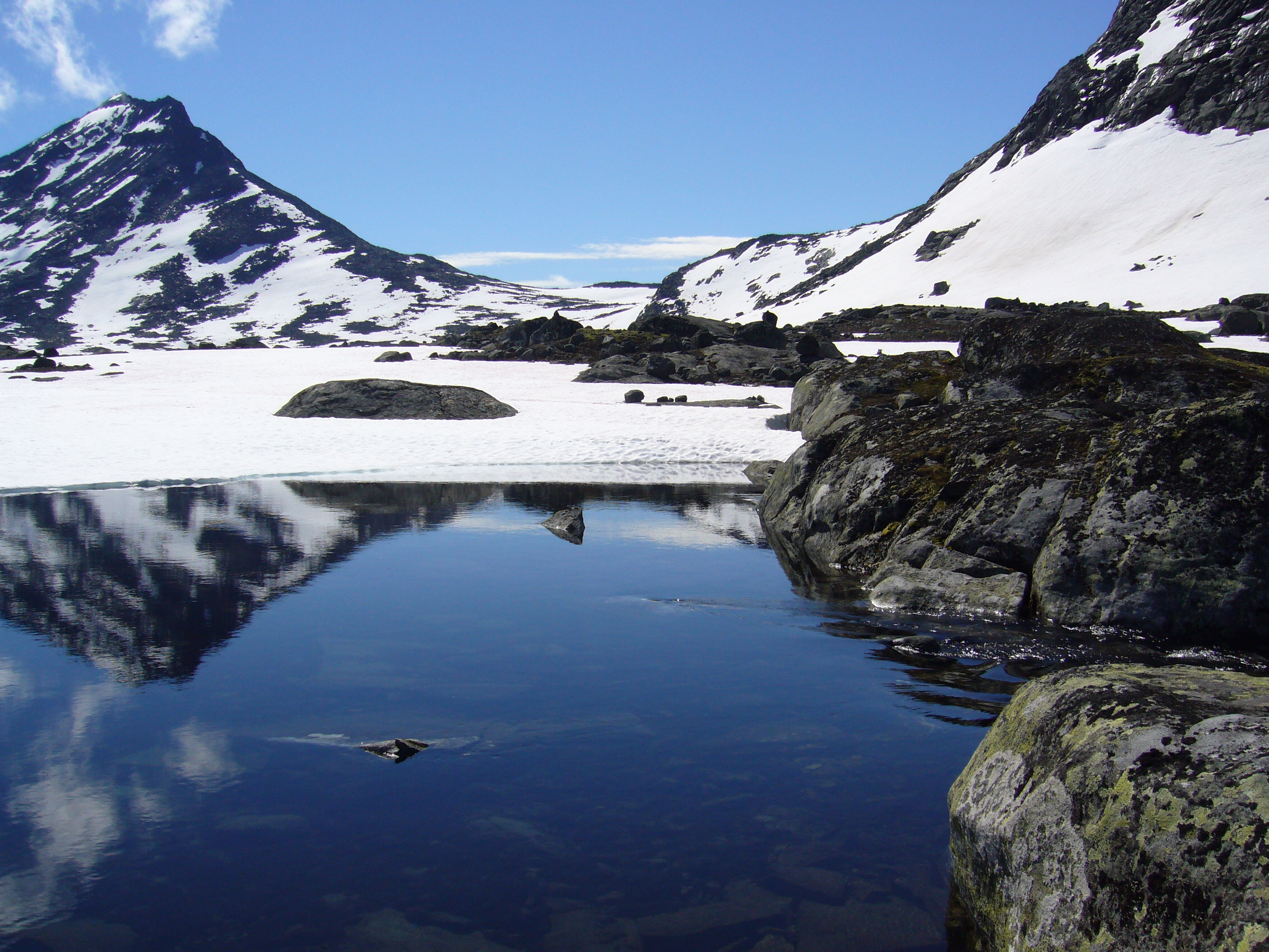 Blick von der Hütte Olavsbu Richtung Snoholstinden (2142m)